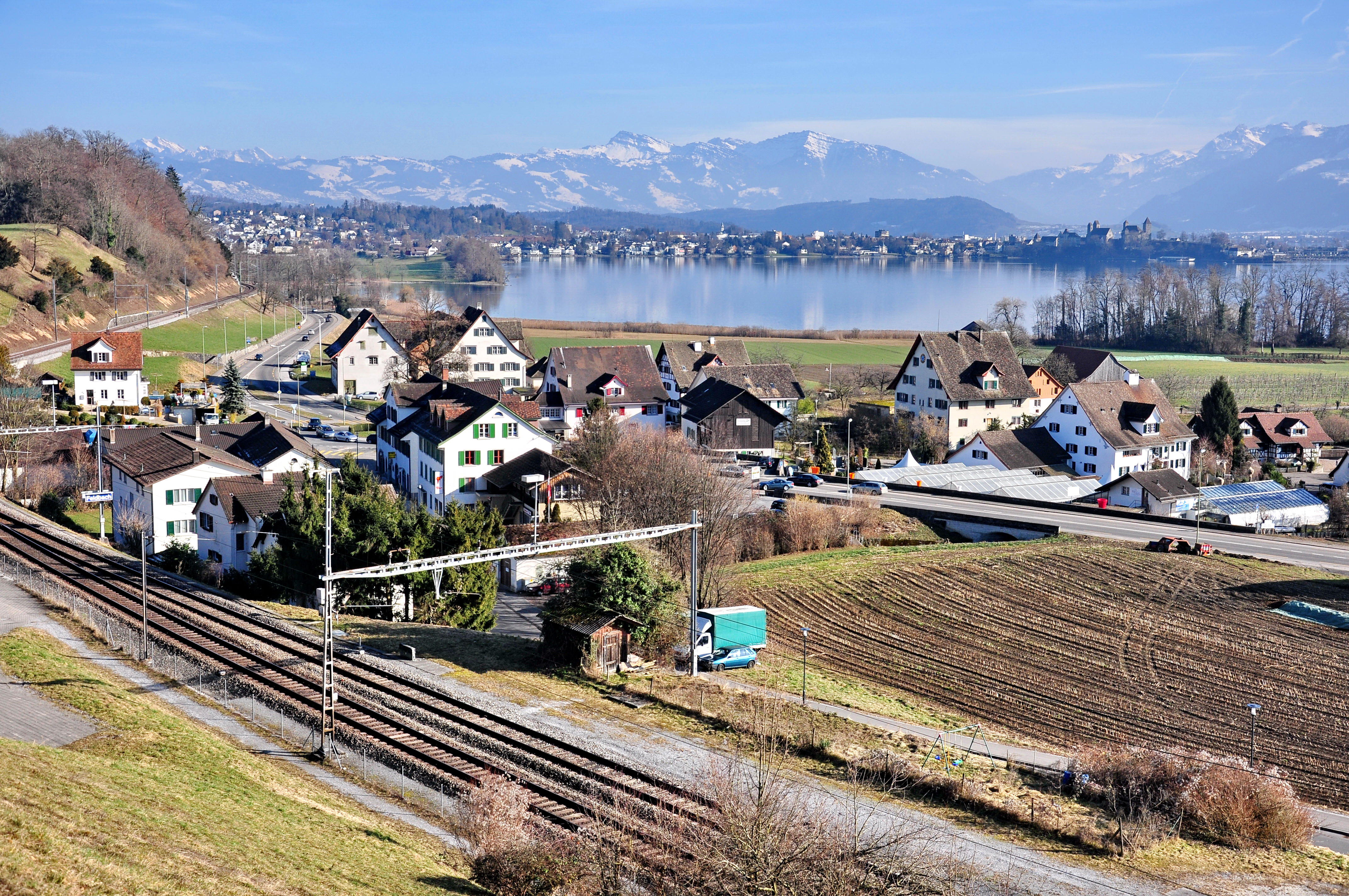 Kempratner Bucht (Bay of Kempraten) and Herrenberg in Rapperswil (Switzerland), i.e. Stadtmuseum, Stadtpfarrkirche St. Johann (St. John's Church), Liebfrauenkapelle and Schloss Rapperswil respectively Lindenhof hill, as seen from Feldbach; Obersee (upper Lake Zürich) in the background.